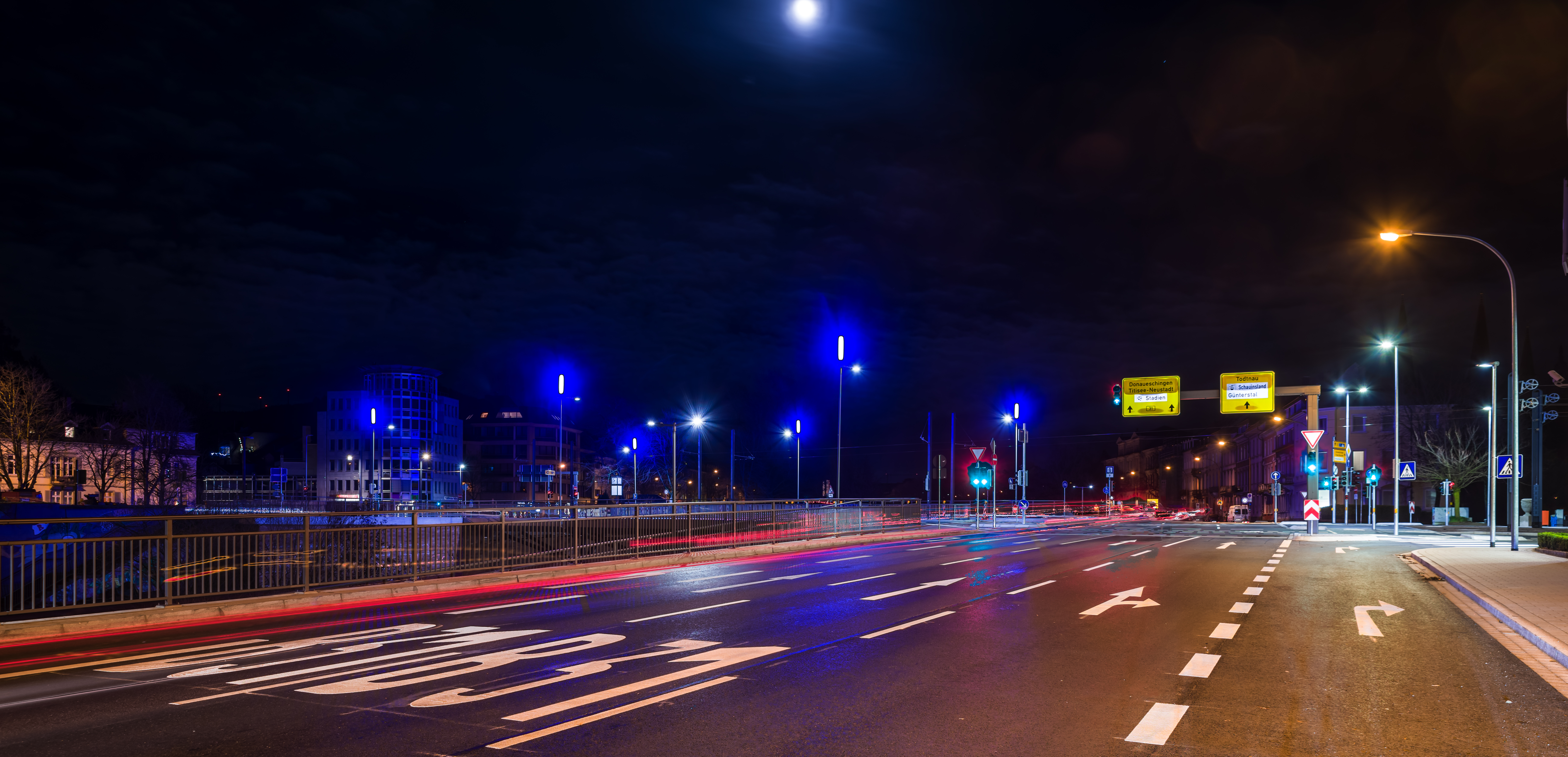 Die Kronenbrücke bei Nachrt am 24. Dezember 2018